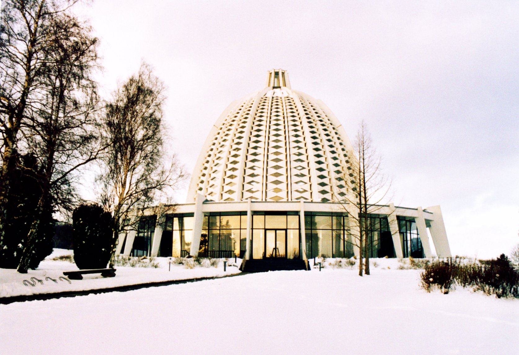 Das Haus der Andacht in Hofheim am Taunus